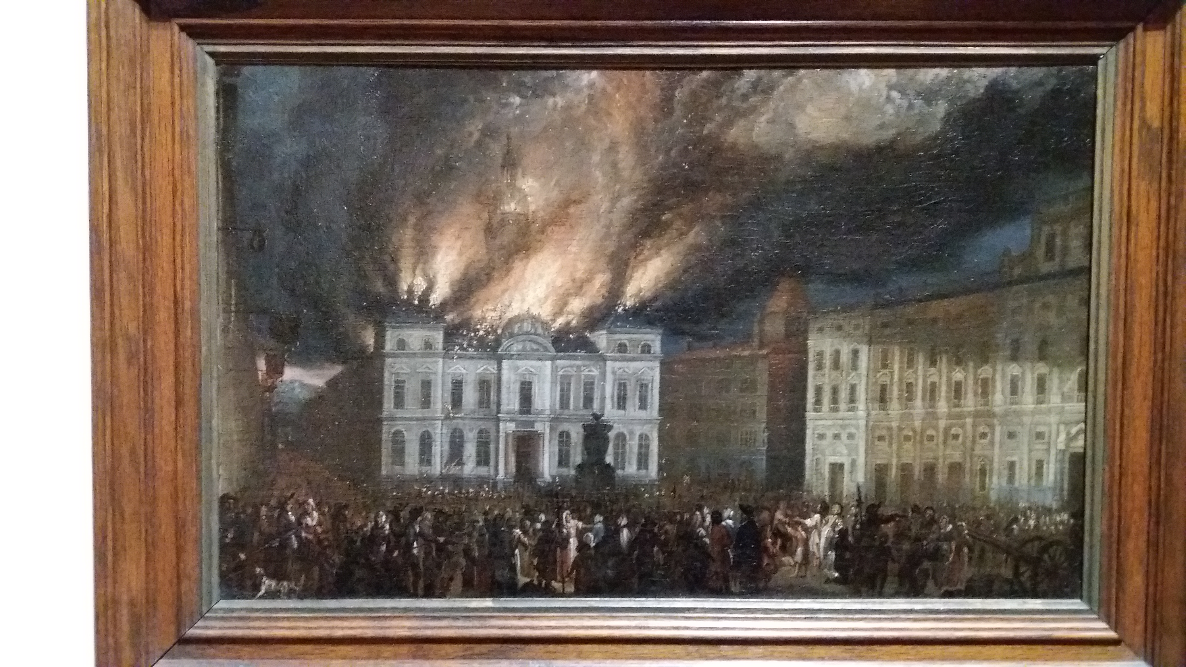 Incendie de l'hôtel de ville de Lyon en 1674. Huile sur toile. Musées Gadagne, inventaire N.22 (don Leroudier, 1926).